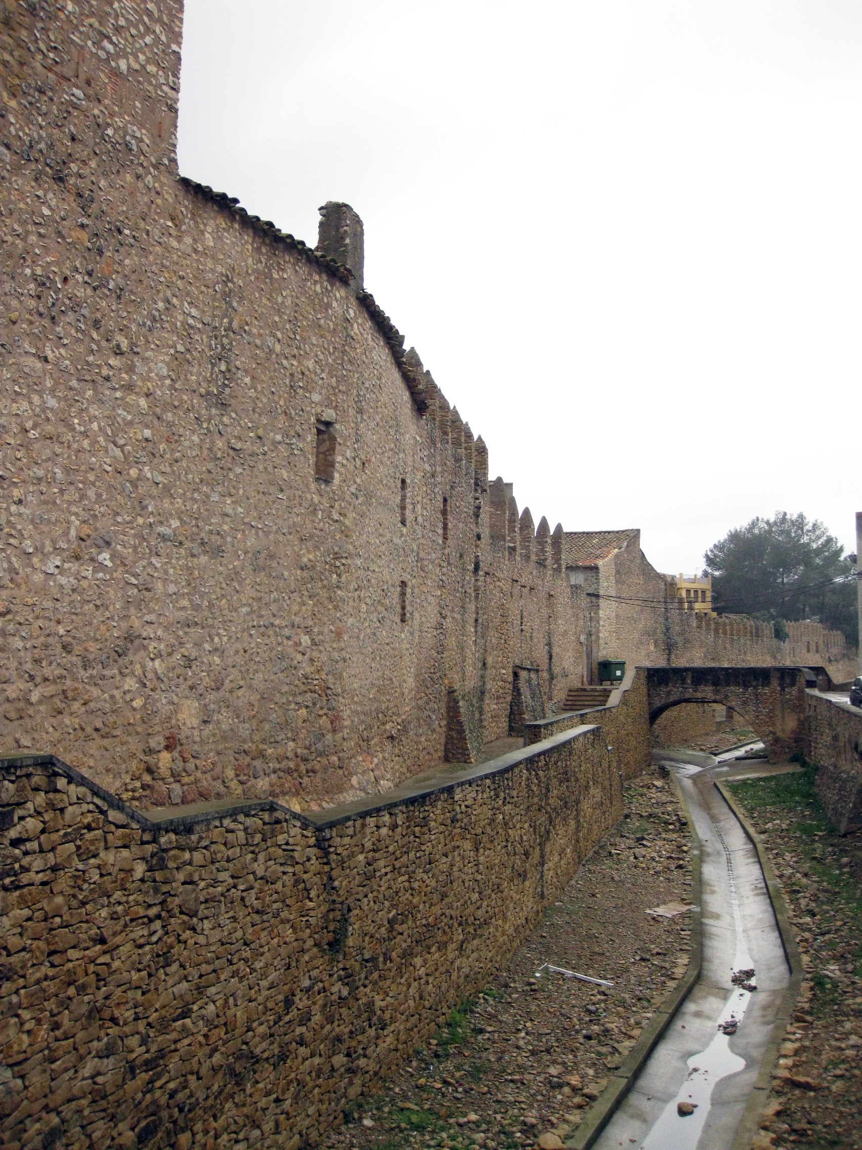 Muralla_est_i_riu_del_Palau (Sant Mateu)